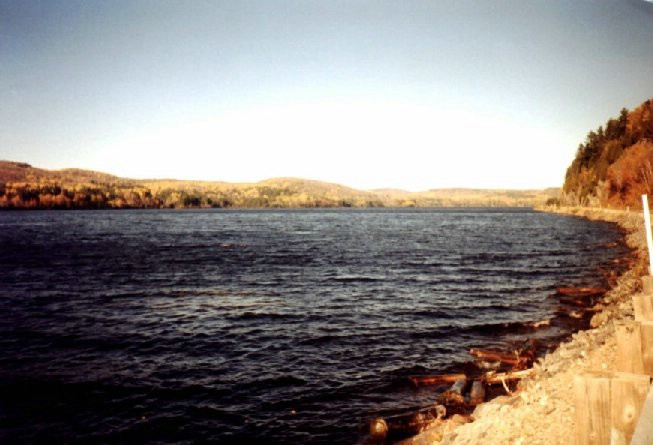 Au bord de la route 155-Nord, vue de la rivière Saint-Maurice, au Québec, dans l'un de ses endroits les plus larges.